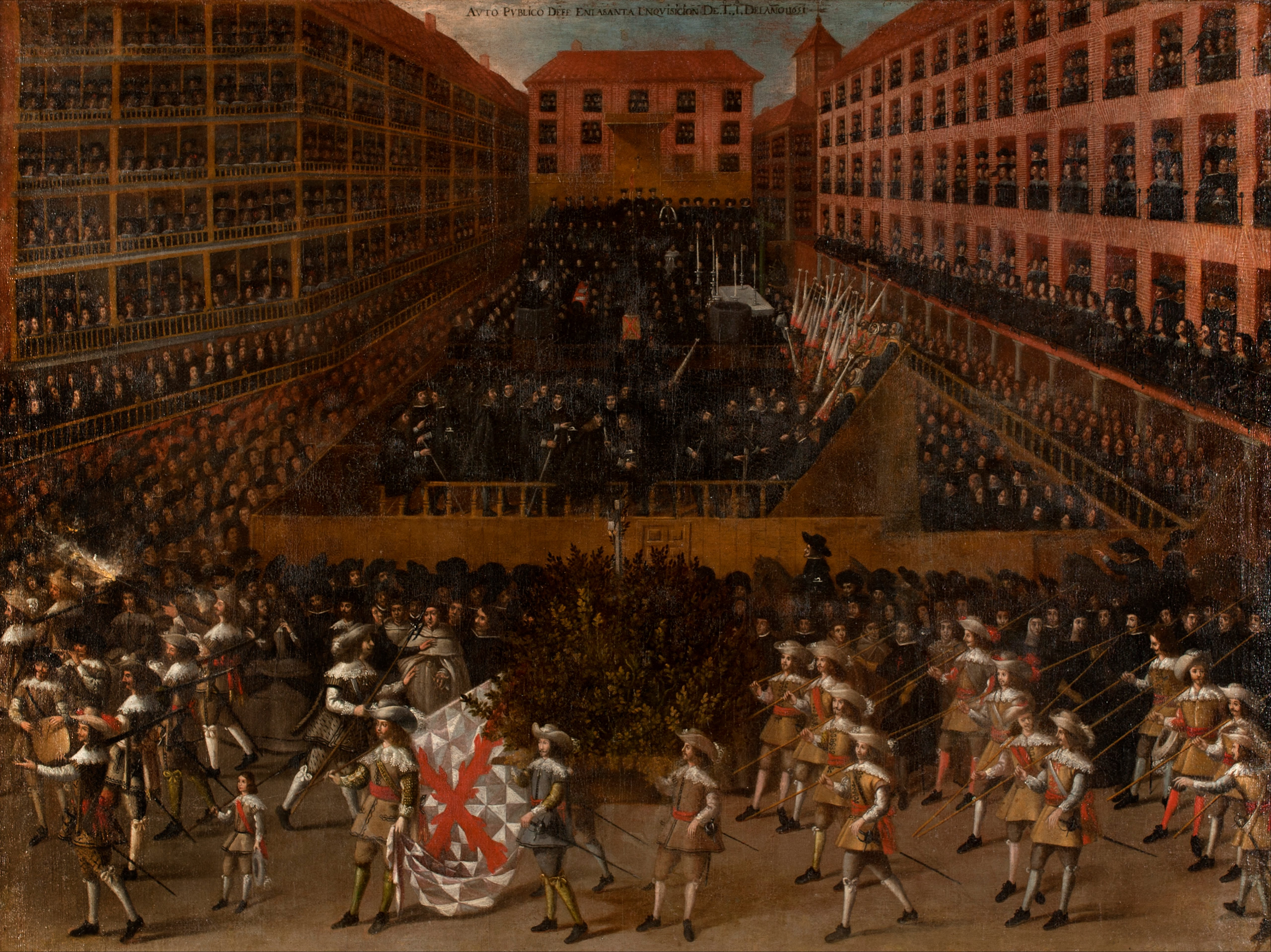 La obra representa un auto de fe celebrado en el siglo XVII en una gran plaza pública española.